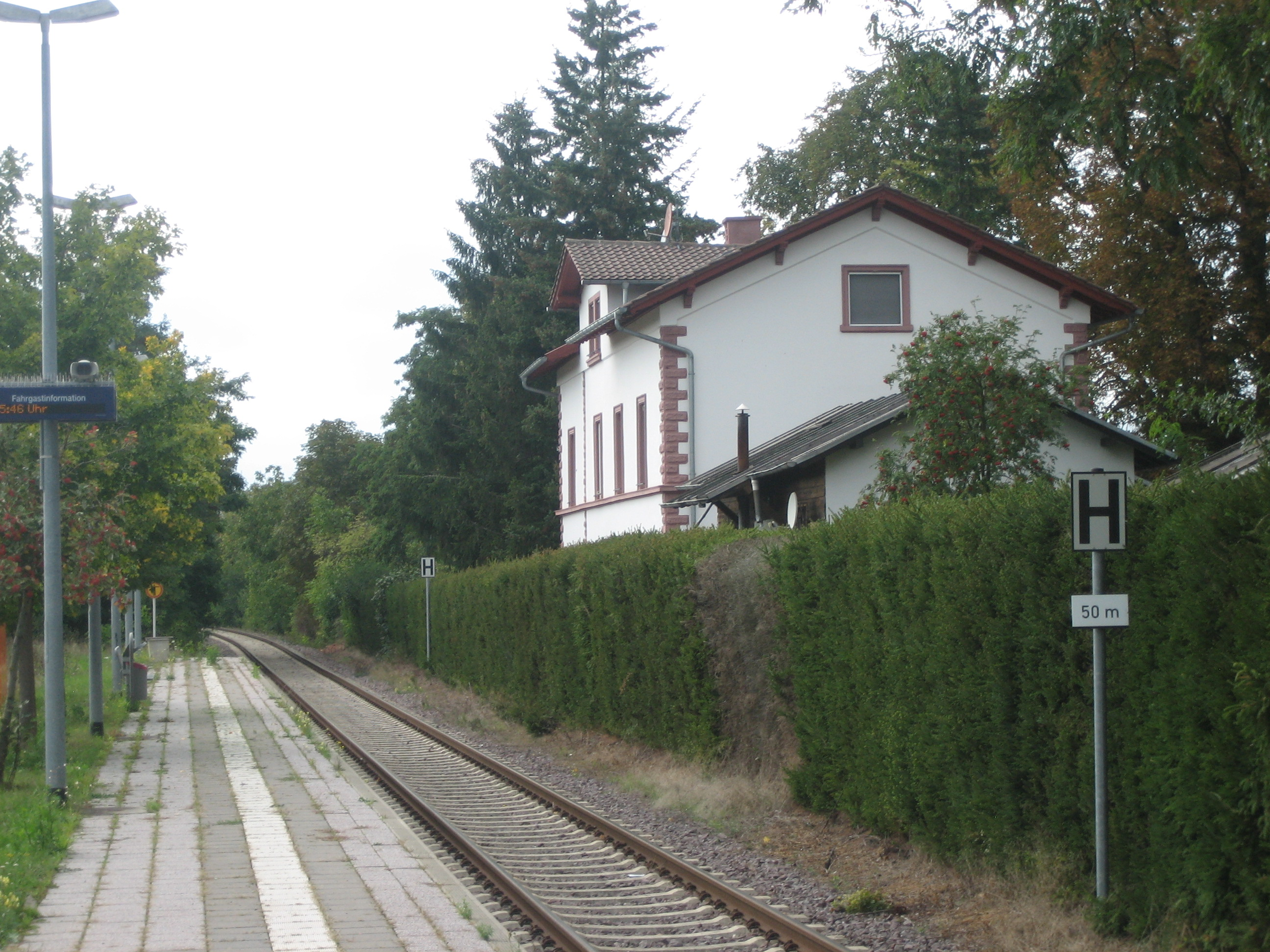 Bezeichnung: Bahnhof Lage: Bahnhofstraße 21 Ort: Ebertsheim Bauzeit: 1876 Beschreibung: ehemaliger Bahnhof; Typenbau, spätklassizistische und Neurenaissancemotive